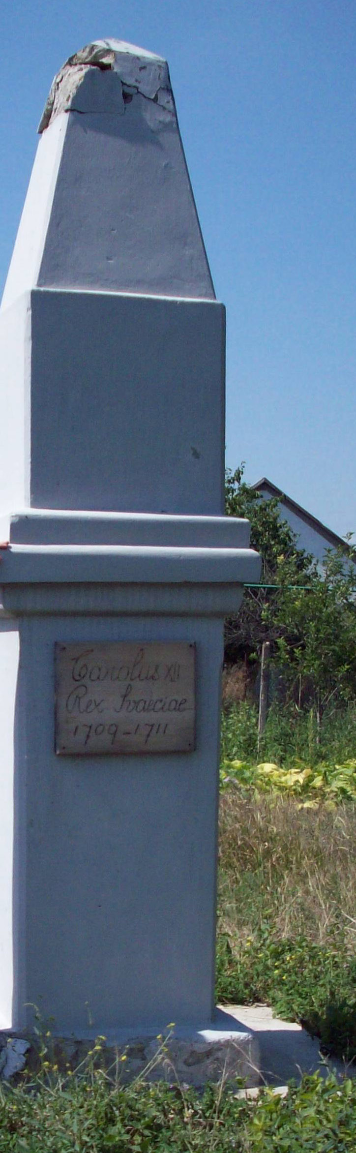 Памятный знак Карлу 12